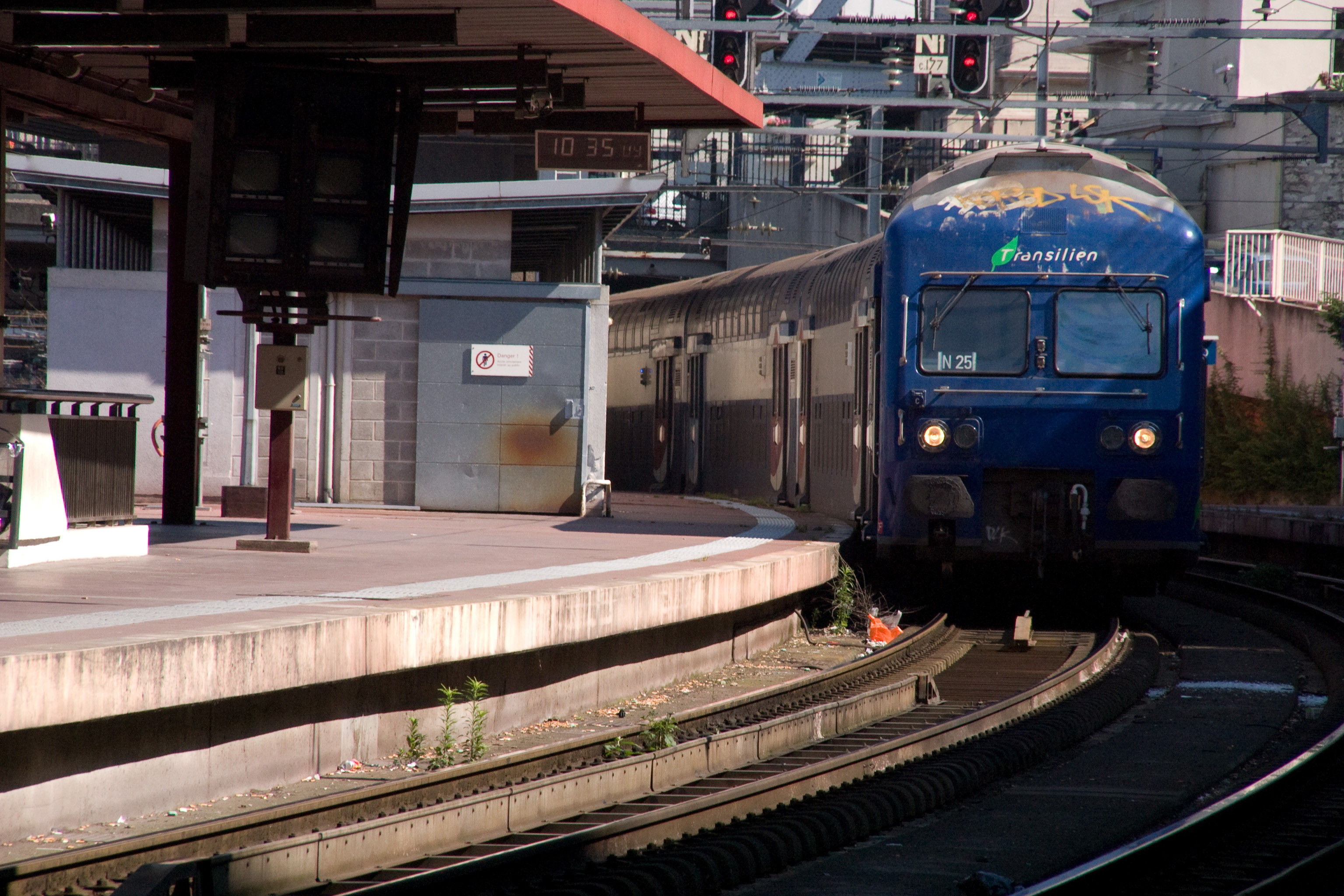 Gare du Nord, Paris, France